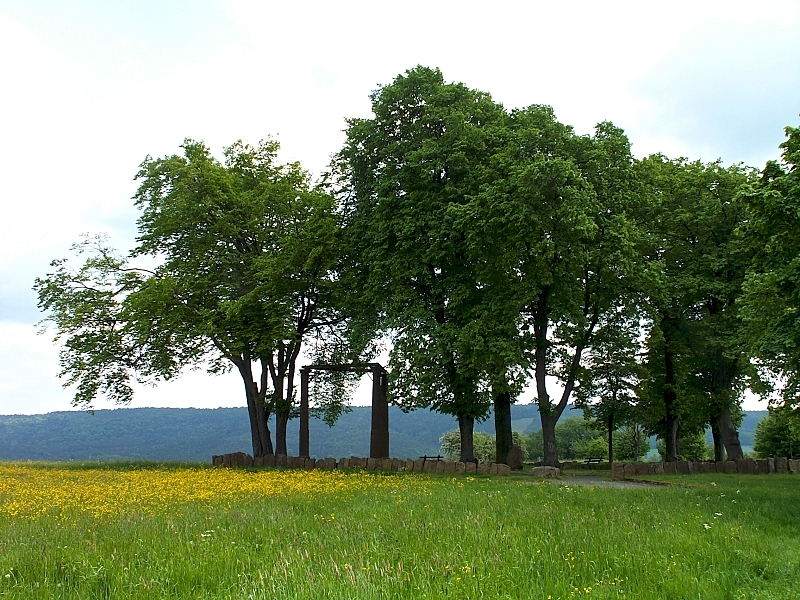 Beerfelder Galgen (Germany, Hessen, Odenwald) - besterhaltener dreischläfriger Galgen Deutschlands - um 1550 errichtet, 1597 erneuert - letzte Hinrichtung 1804 (Zigeunerin wegen Diebstahls eines Huhnes und zweier Brotlaibe)